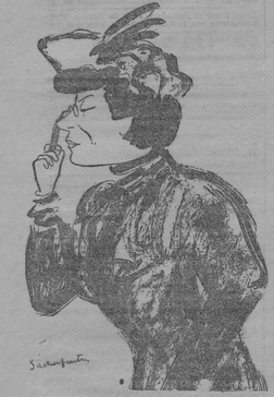 Caricature de Sylviac avec son face-à-main, signée Sacha Guitry